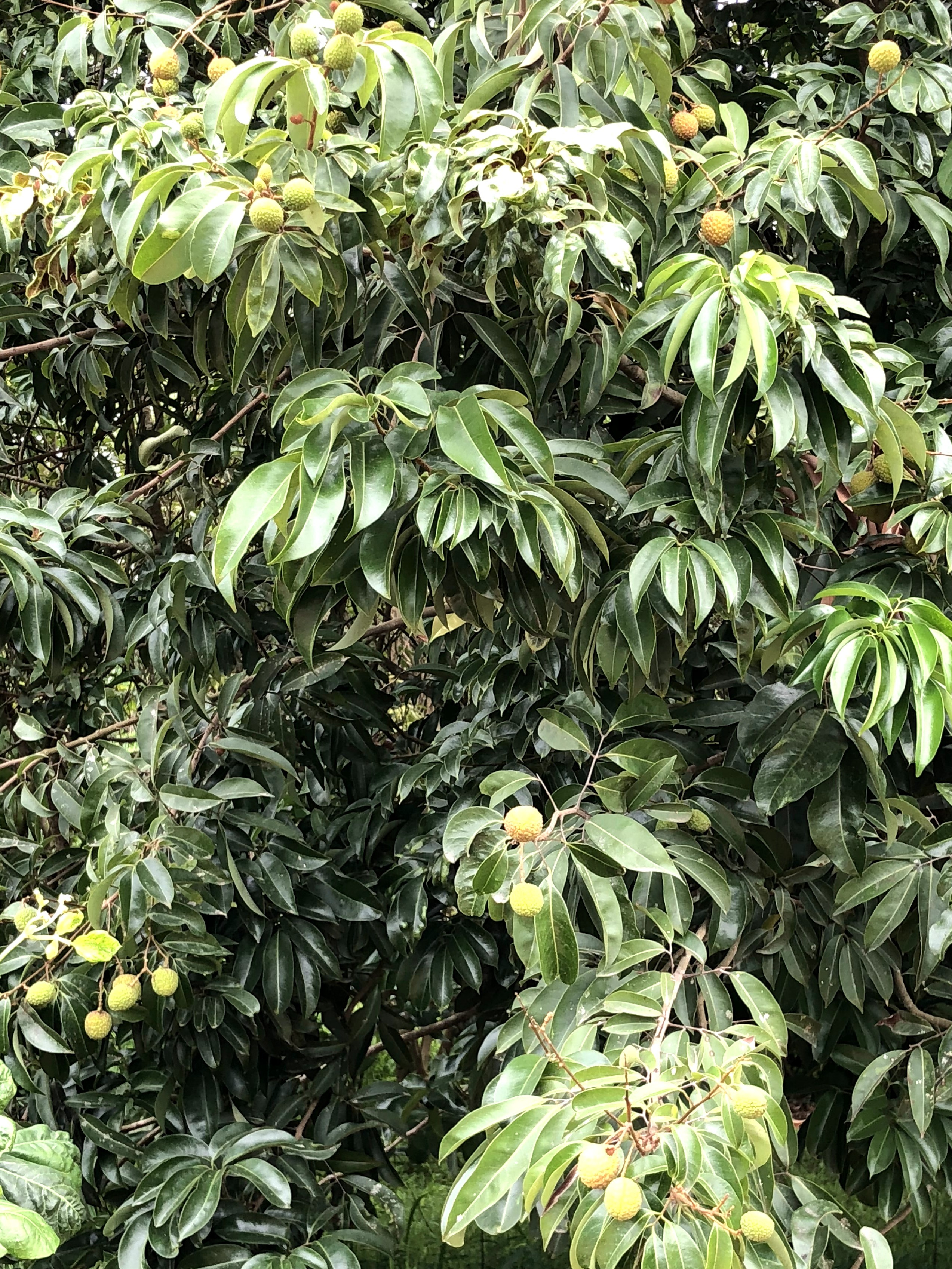 鹿颈村荔枝